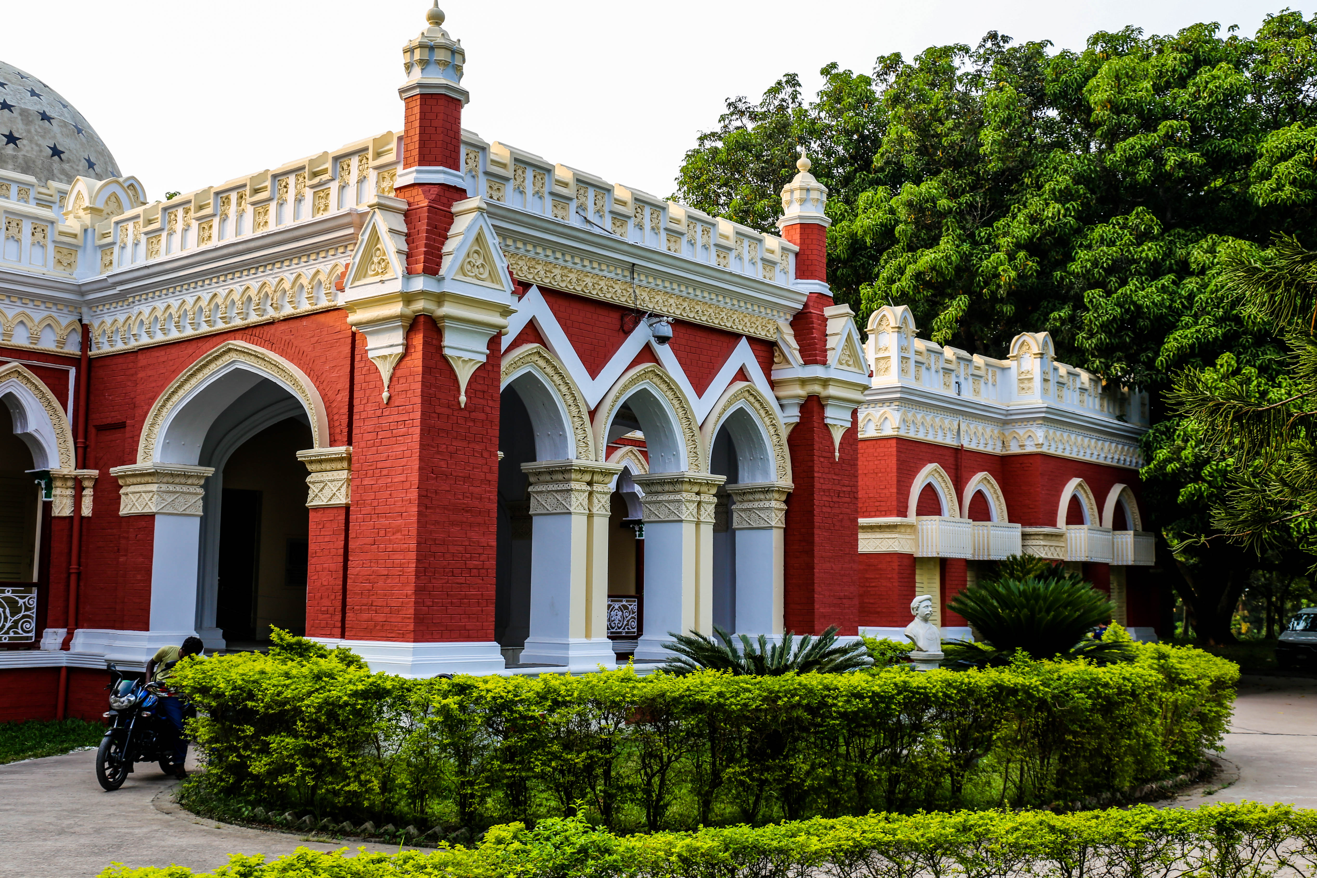 দিঘাপতিয়া রাজবাড়ি (উত্তরা গণভবন)